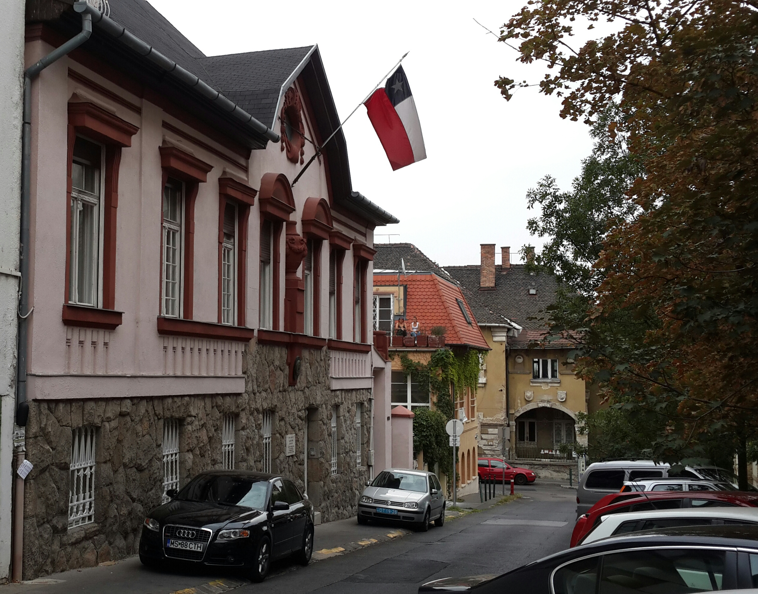 Sede de la Embajada de Chile en Hungría. - Loc.:Budapest, II. Rózsahegy u. 1/b